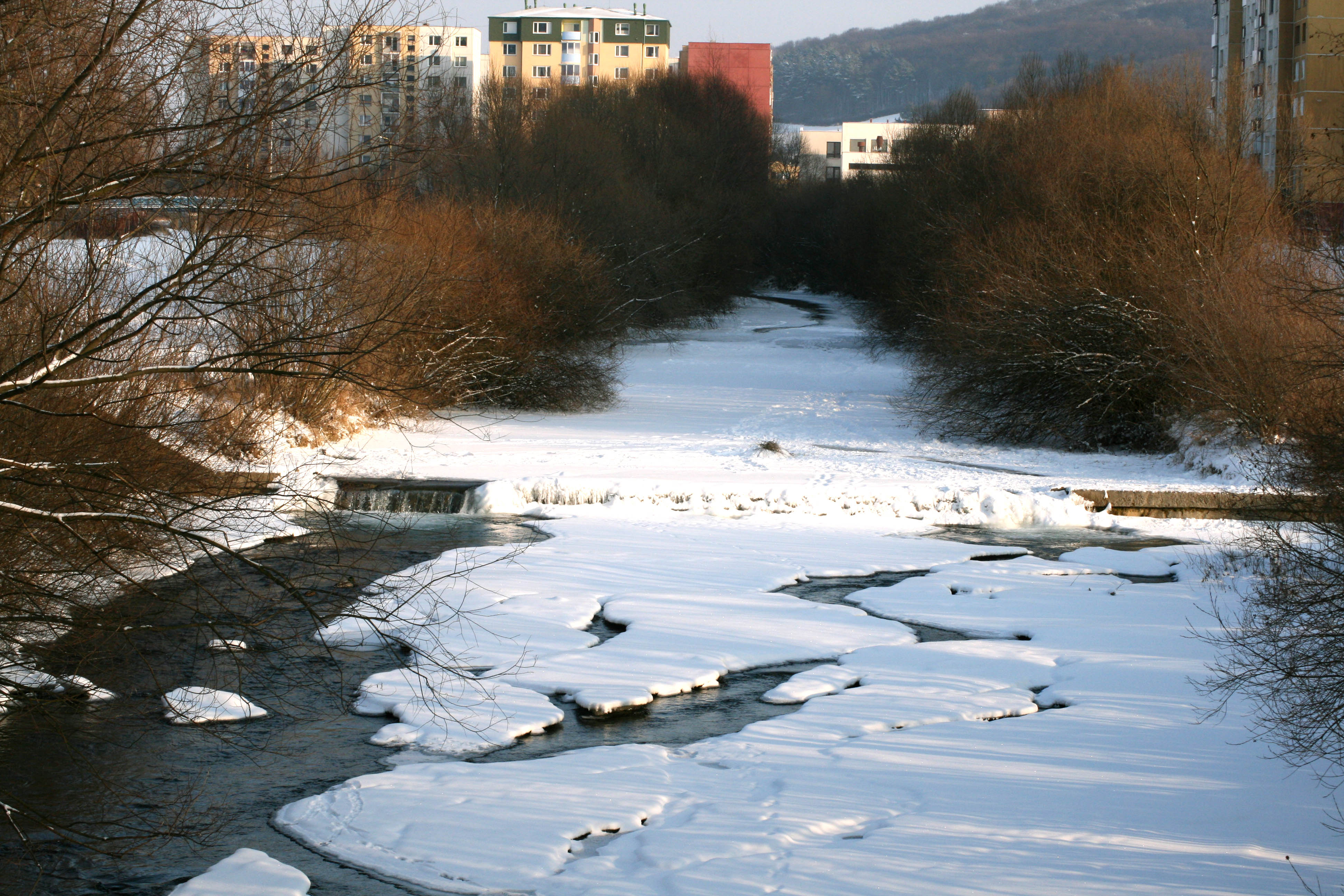 Ladomirka vo Svidníku v bezprostrednej blízkosti pred sútokom do Ondavy